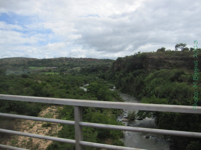 Riviere Saharenana, proche d' Antananandrenitelo (Diana), vue de la Route Nationale 6